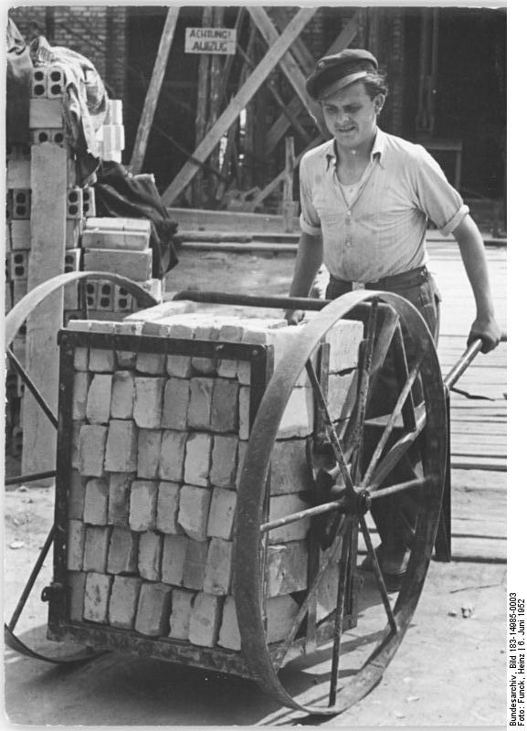 Zentralbild Funck 6.6.1952 Technische Verbesserung in der Karl-Marx-Allee. Auf vielen Bauabschnitten des Nationalen Aufbauprogramms wurden in der letzten Zeit technischen Verbesserungen eingführt. Der Transport von Steinen und Kalkästen durch Hucker entfällt auf der Baustelle der Bau-Union Potsdam am Block F-Süd durch Steinrahmen, die 96 Steine fassen, und ohne besondere Anstrengung auf zweirädrige Karren gesetzt und bis an den Arbeitsplatz transportiert werden können. UBz: Koll. Borchert, Bau-Union Potsdam, mit dem Transportkarren.